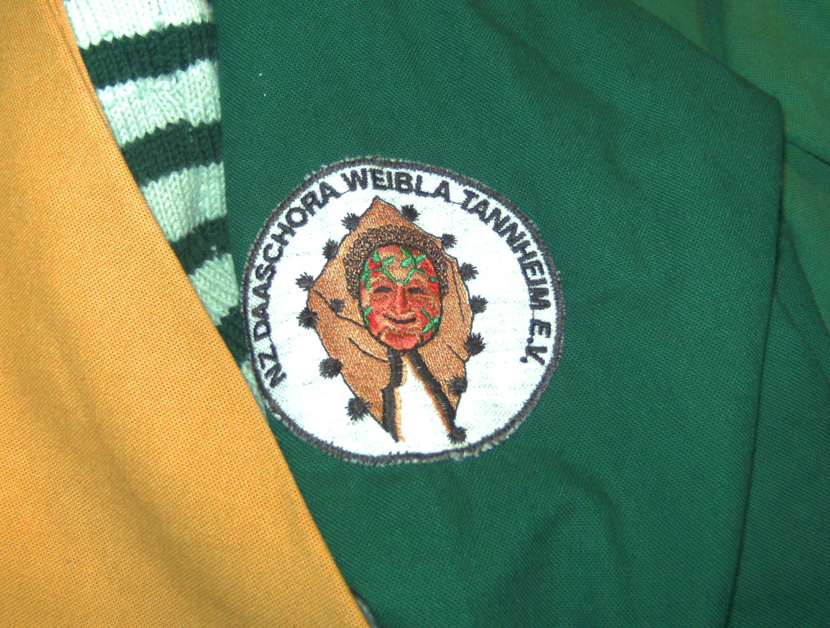 Wappen auf dem Häs eines Narren des Alemanischen Narrenrings